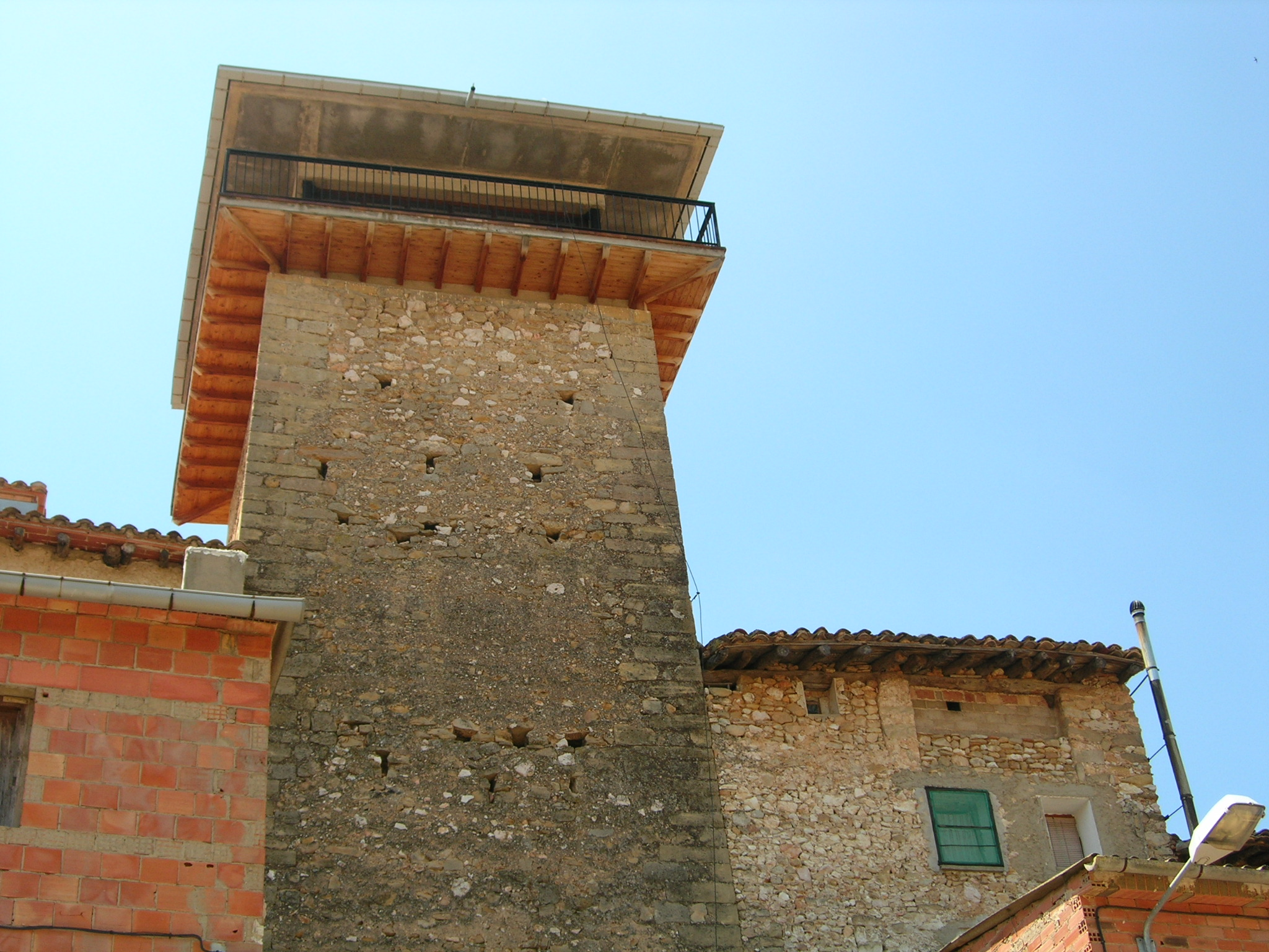 Torre dels Moros (Fondespatla)